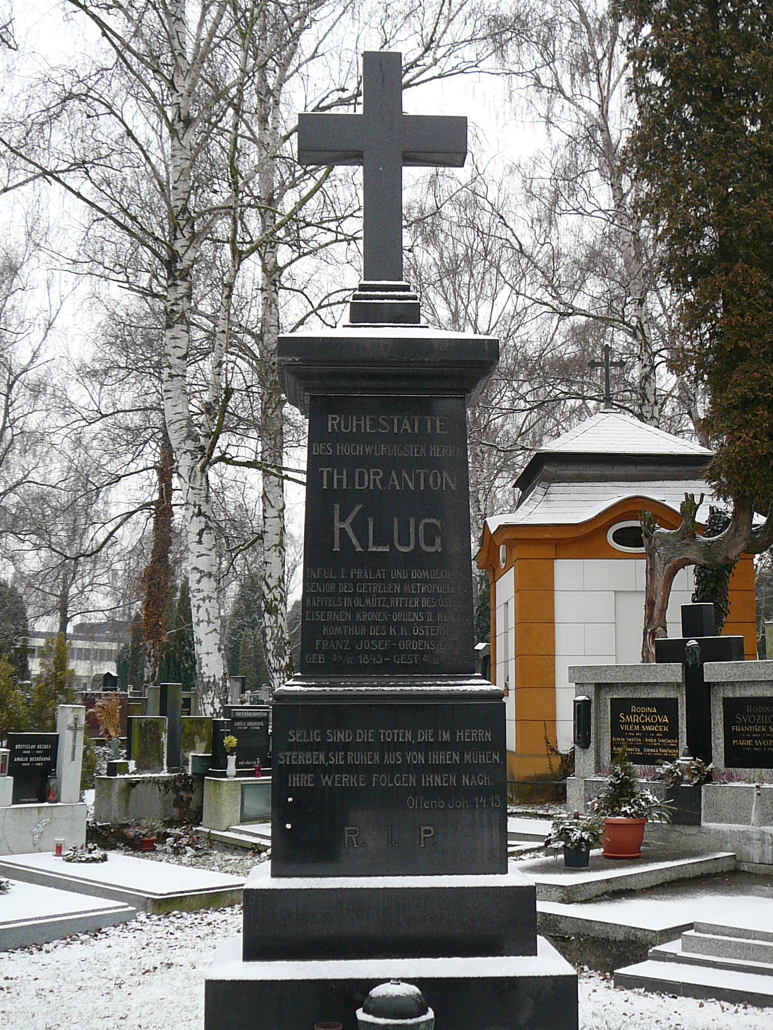 Místo odpočinku Prof. ThDr. Antonína Kluga na ústředním hřbitově v Olomouci-Neředíně